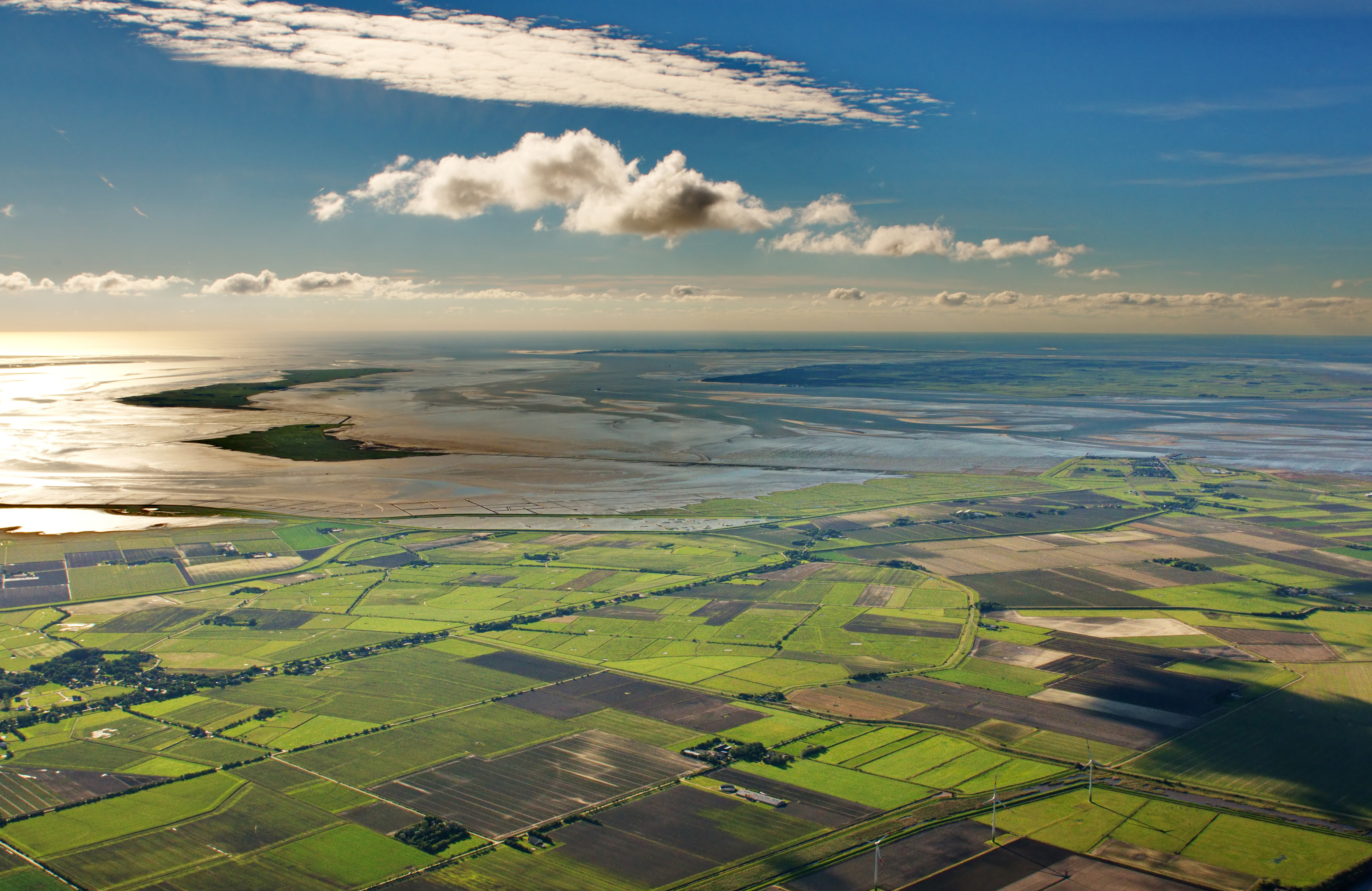 Fotoflug über das nordfriesische Wattenmeer – v.l.: Die Halligen Langeneß und Oland, hinten Amrum, in der Mitte Föhr im Vordergrund der Hafen von Dagebüll.